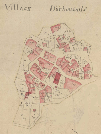 Imatge extreta del Cadastre Napoleònic del 1812, dels Arxius Departamentals de Perpinyà, de lliure disposició si se'n cita la procedència.